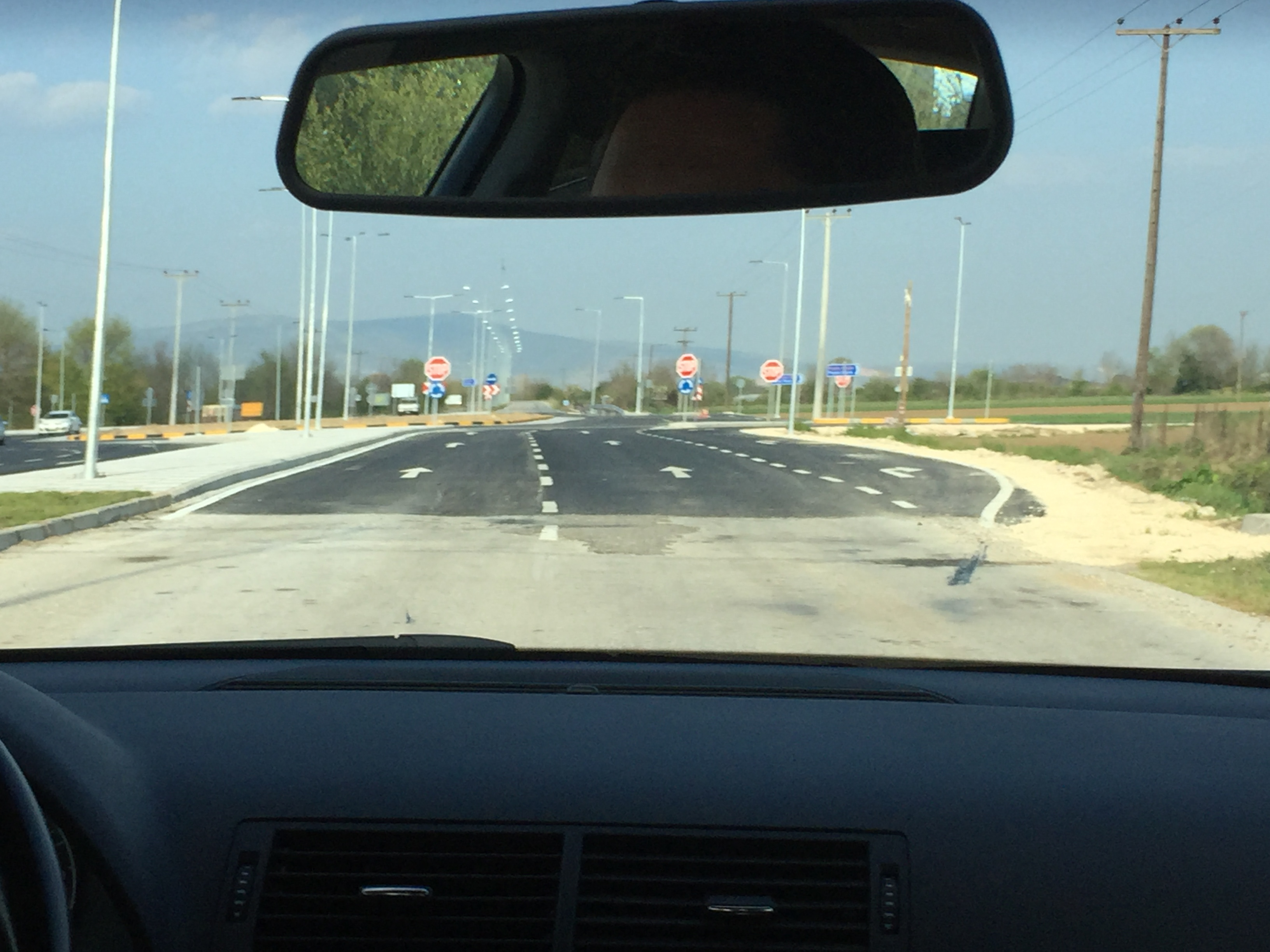 Ο νέος κυκλικός κόμβος των Καρυών της Περιφερειακής Οδού Τρικάλων